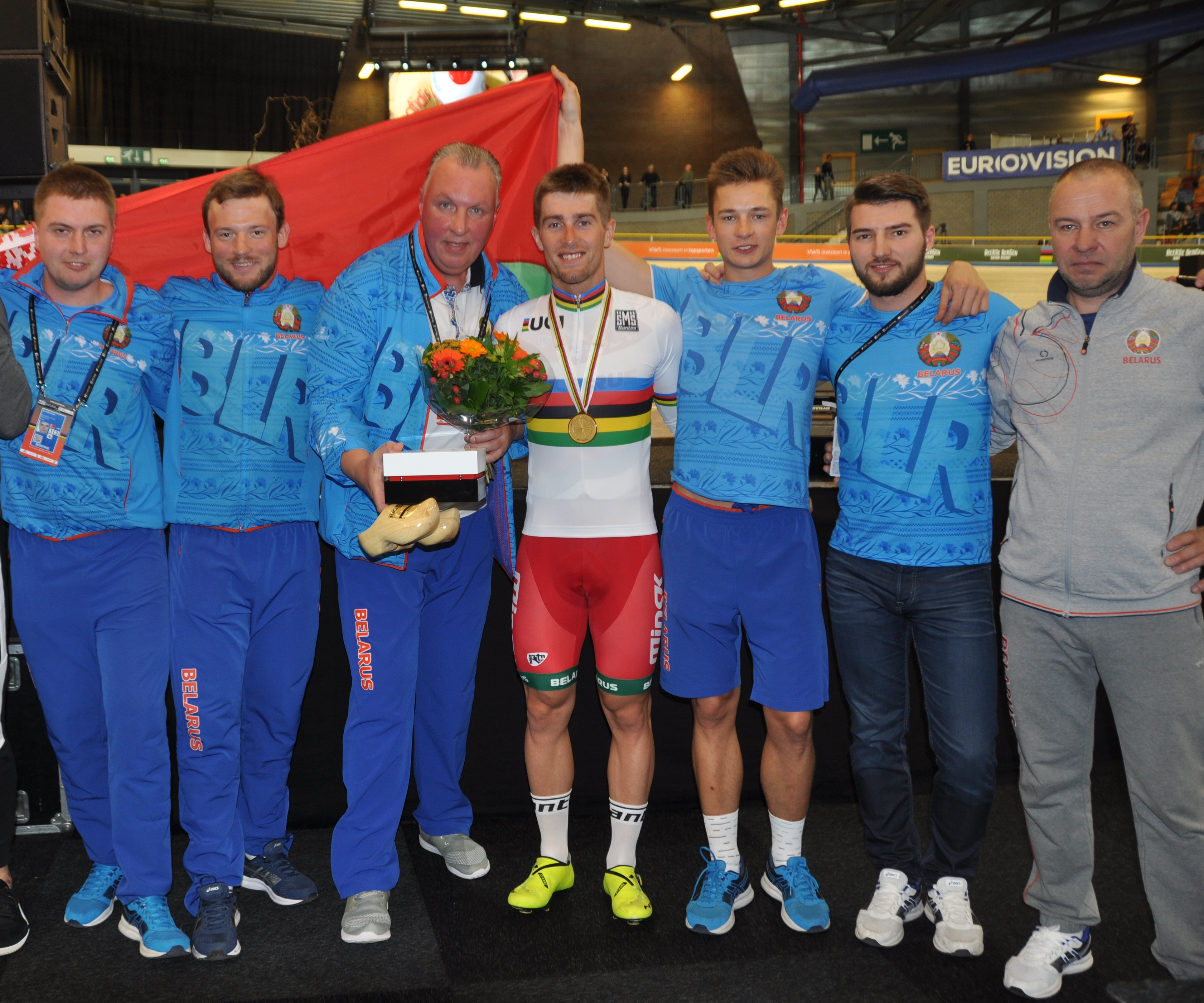 Die weißruss. Mannschaft mit Yauheni Karaliok, Weltmeister im Scratch